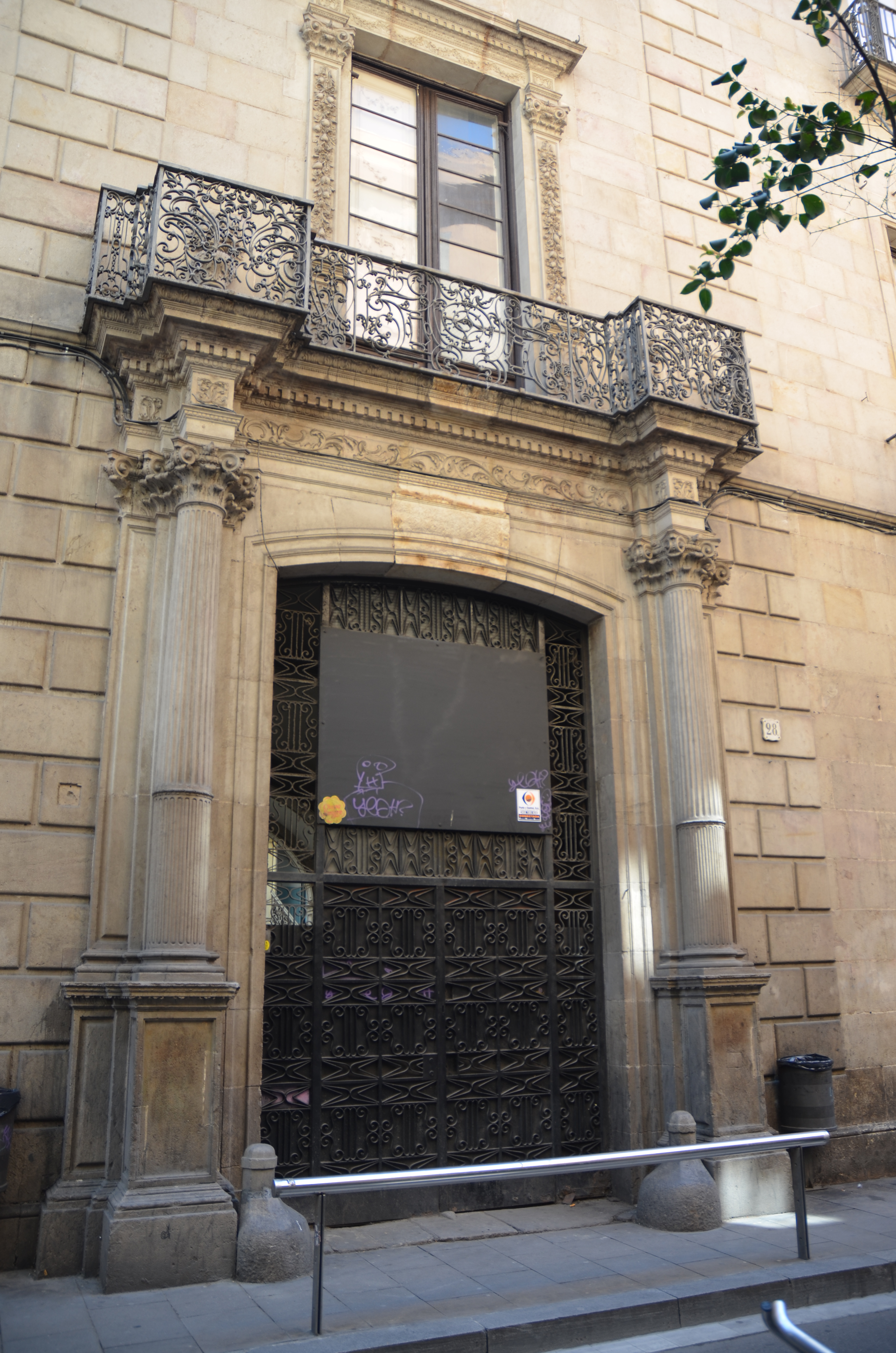 Barcelona. Palau del duc de Sessa (o Larrard), obra de Josep Ribes i Margarit i Joan Soler i Faneca. Façana principal, carrer Ample.